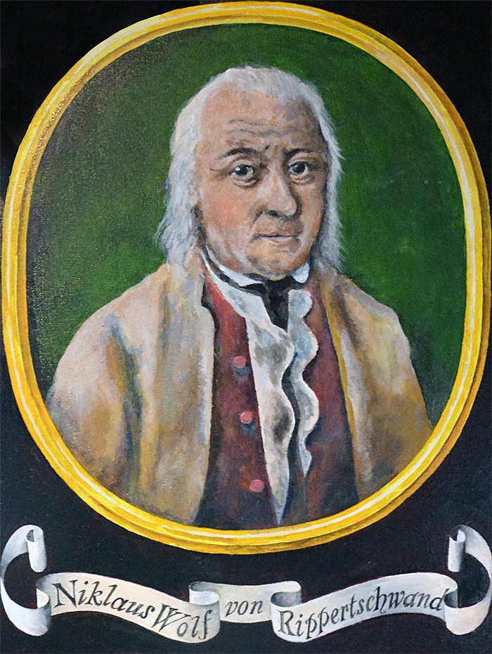 Niklaus Wolf von Rippertschwand Vater Wolf, Gemälde in der Pfarrkirche Beromünster